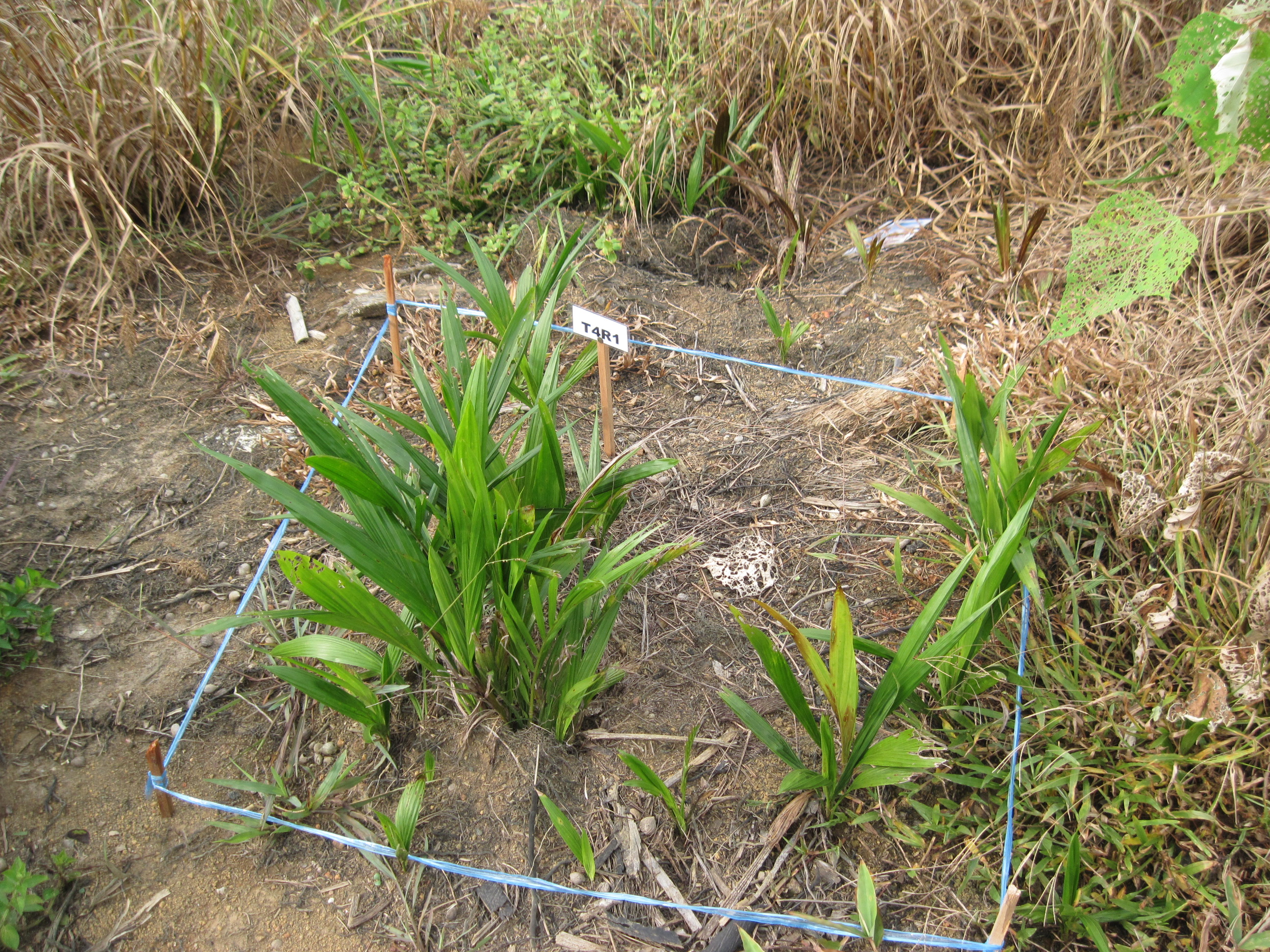 Anak sawit liar (Volunteer oil palm seedlings) tidak mati walaupun telah disembur dengan racun rumpai. Rumpai di sekelilingn mati kecuali anak sawit liar.